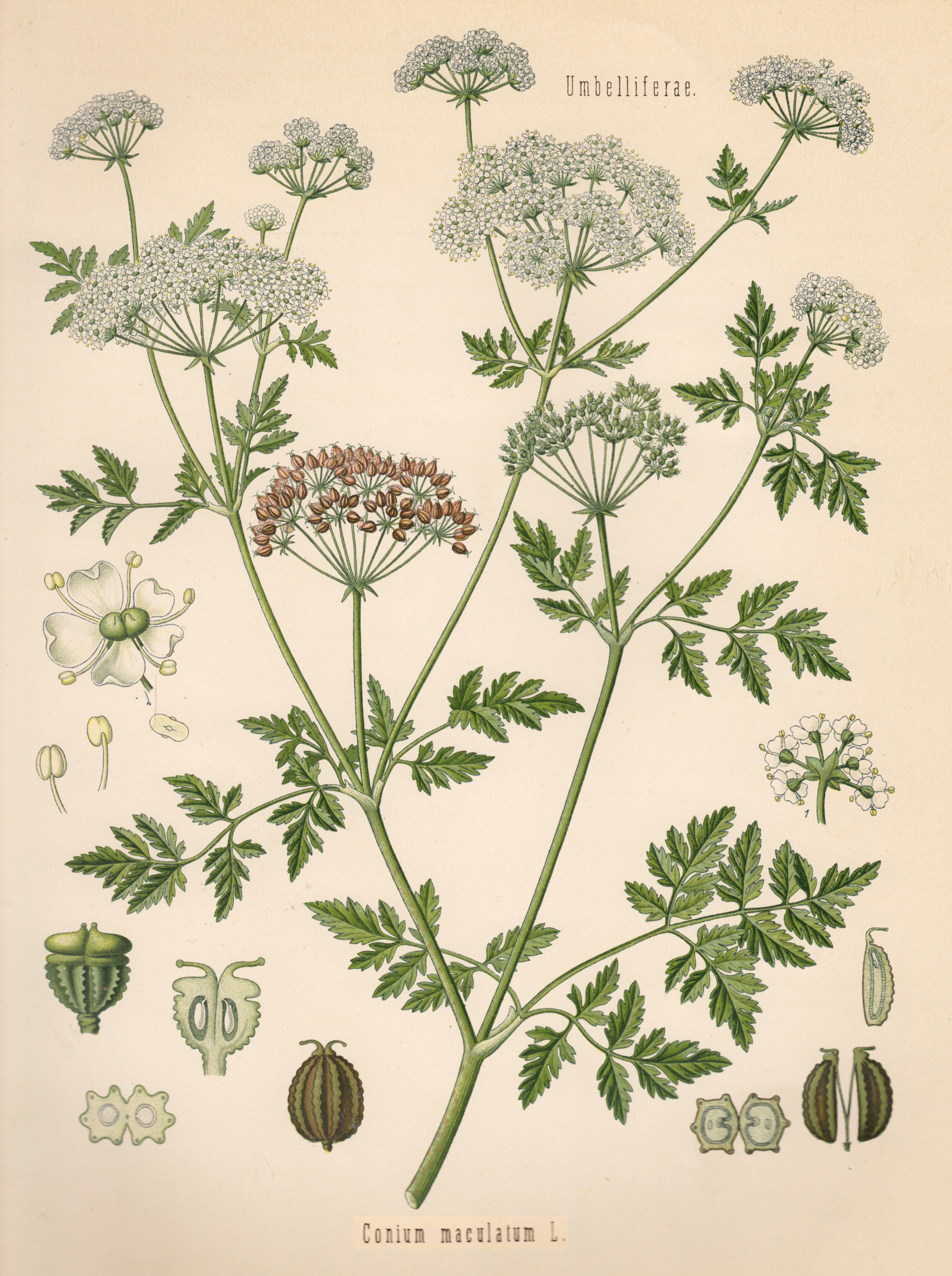 Abbildung von Conium maculatum